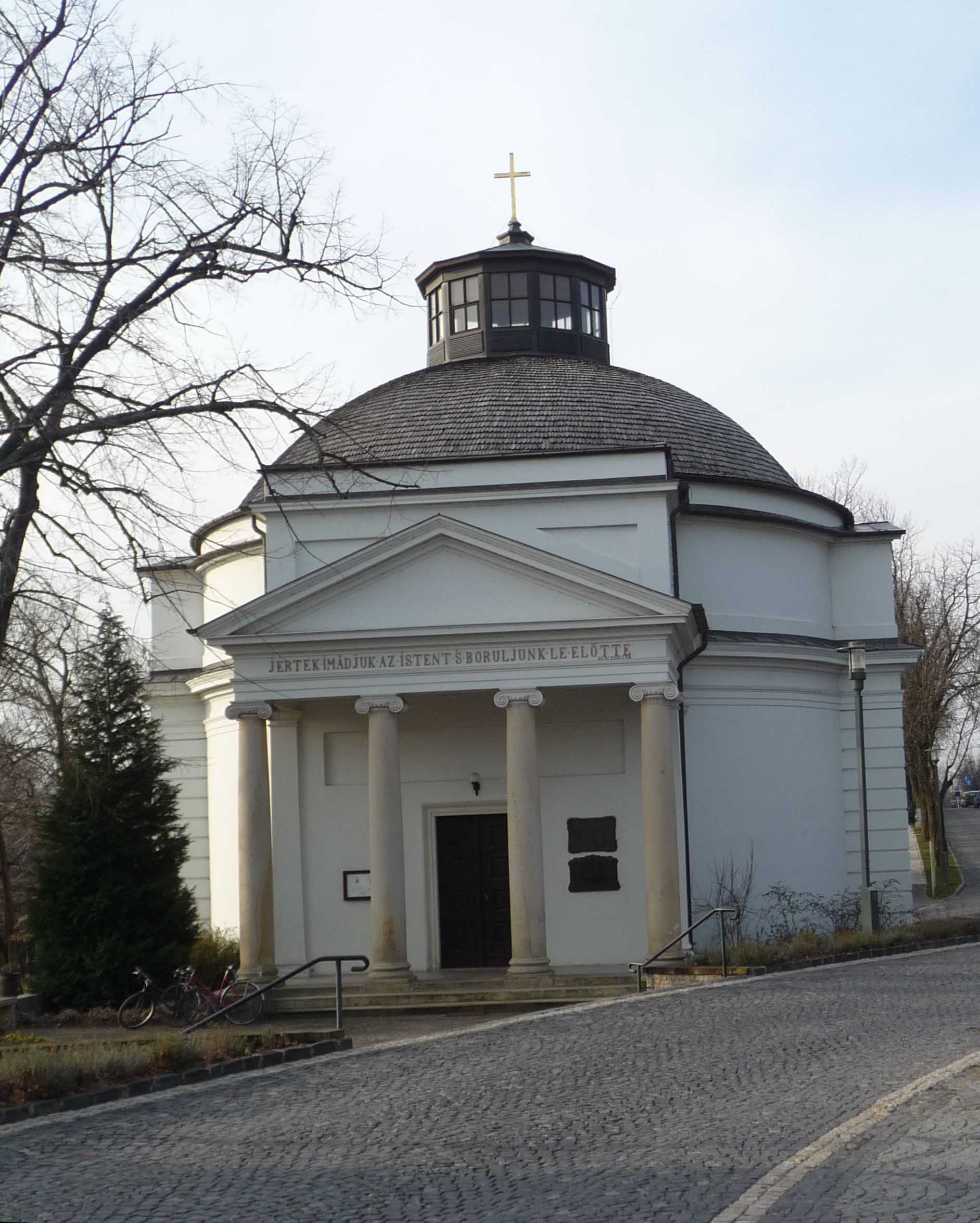 A Kerektemplom Balatonfüreden